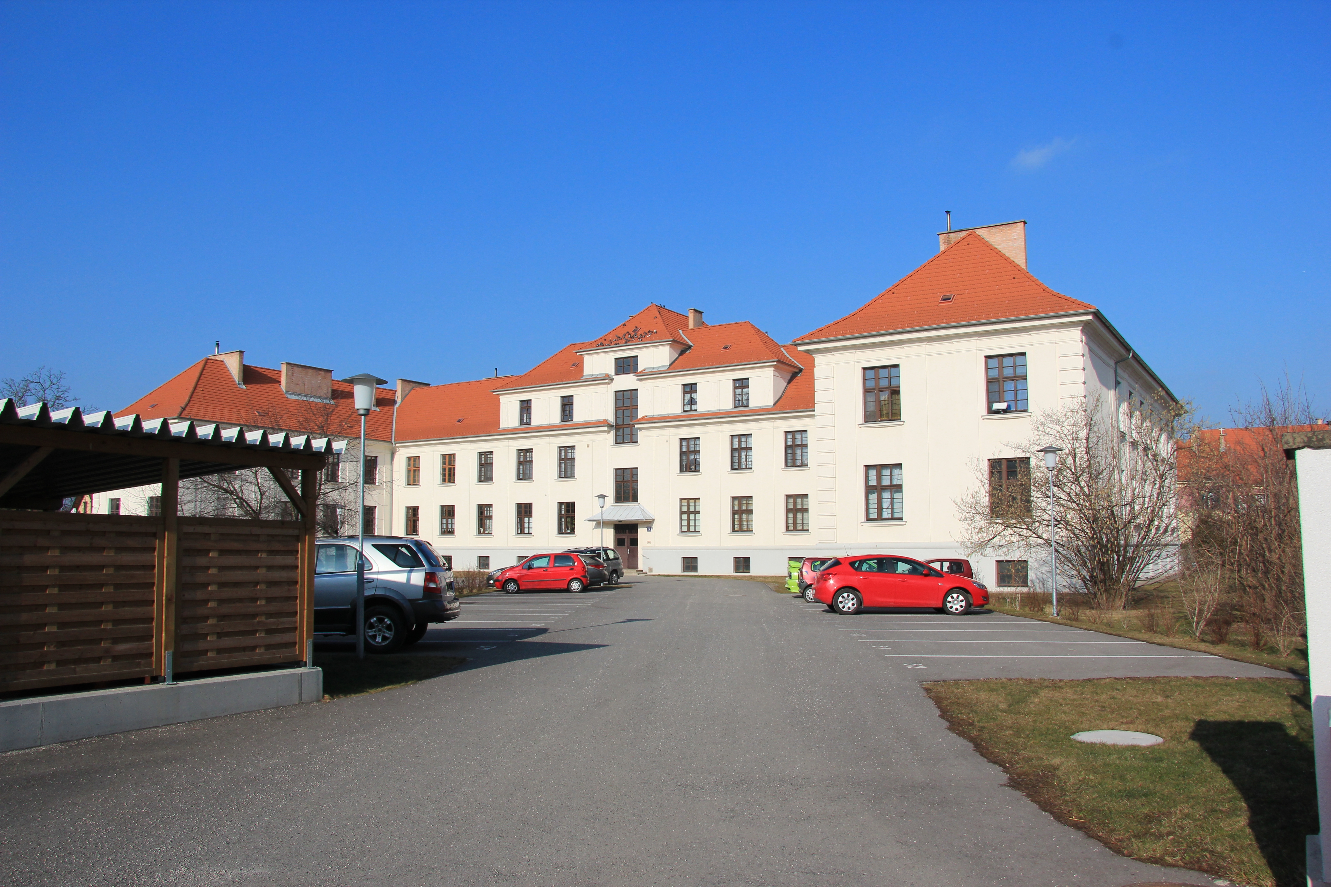 Ehemalige Salvator-Kaserne („Objekt III“) in (Blumau-)Neurißhof, Niederösterreich, Kasernenstraße 3